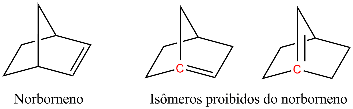 Isômeros do norborneno proibidos pela Regra de Bredt.